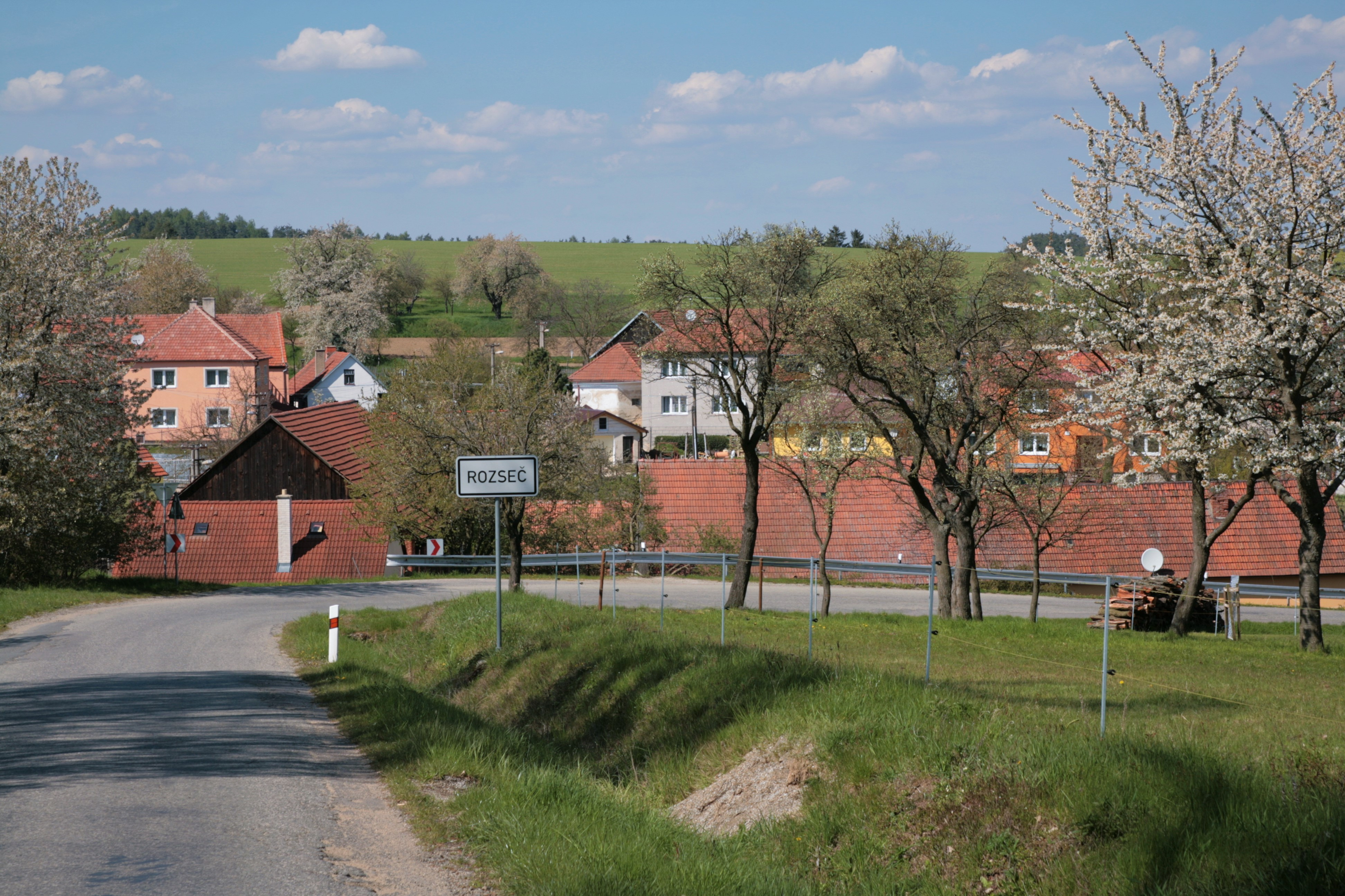 Obec Rozseč v okrese Žďár nad Sázavou. Pohled od jihu z příjezdové silnice od Březí.